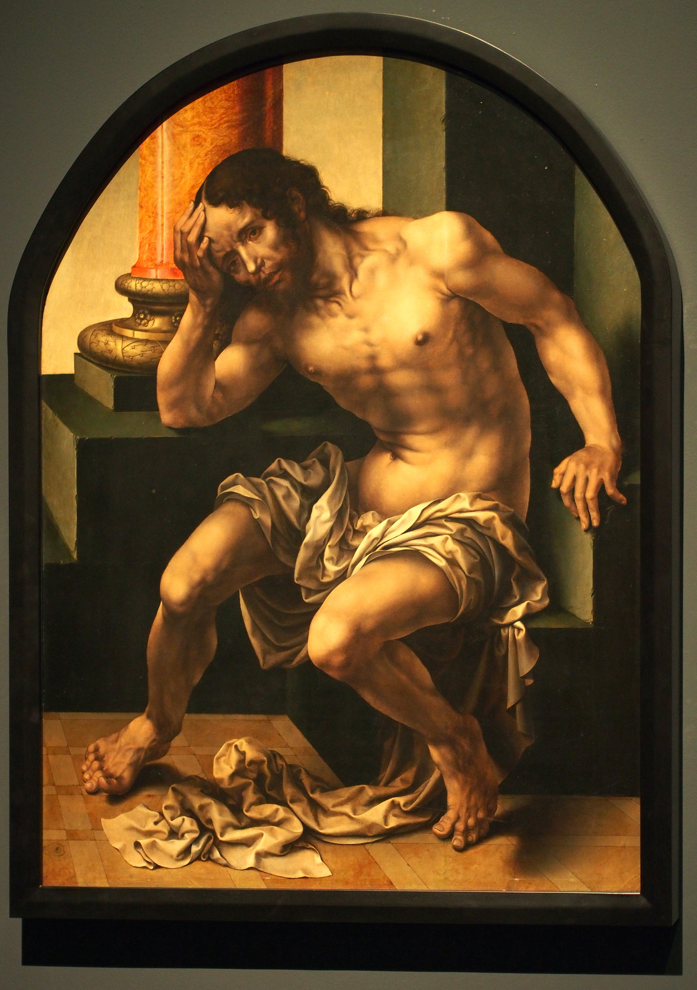 Cristo varón de dolores. Jan Gossaert, alias Mabuse (1478-1532). Museo del Colegio del Patriarca, Valencia.